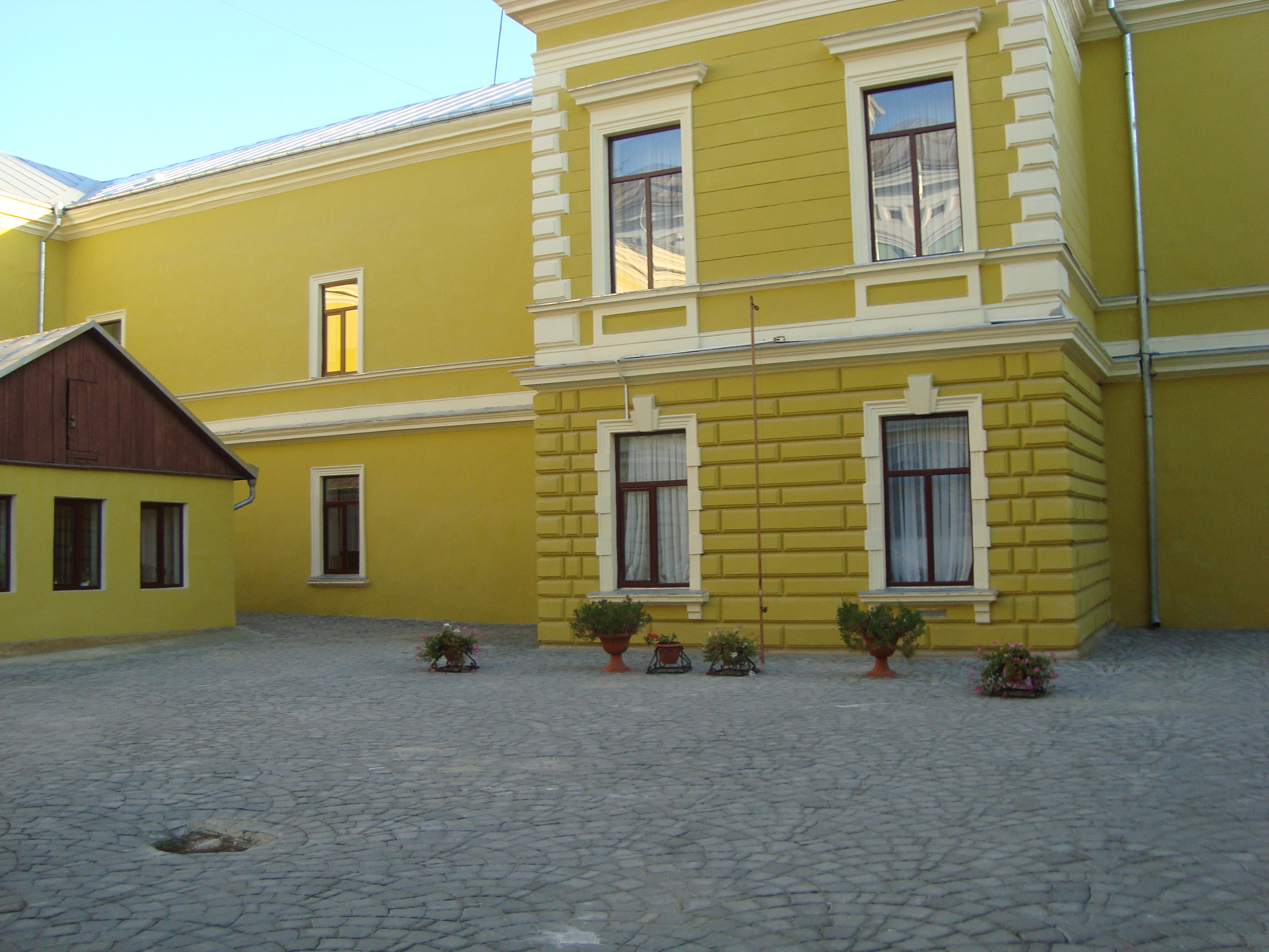 Cernauti. Ober-Gymnasium